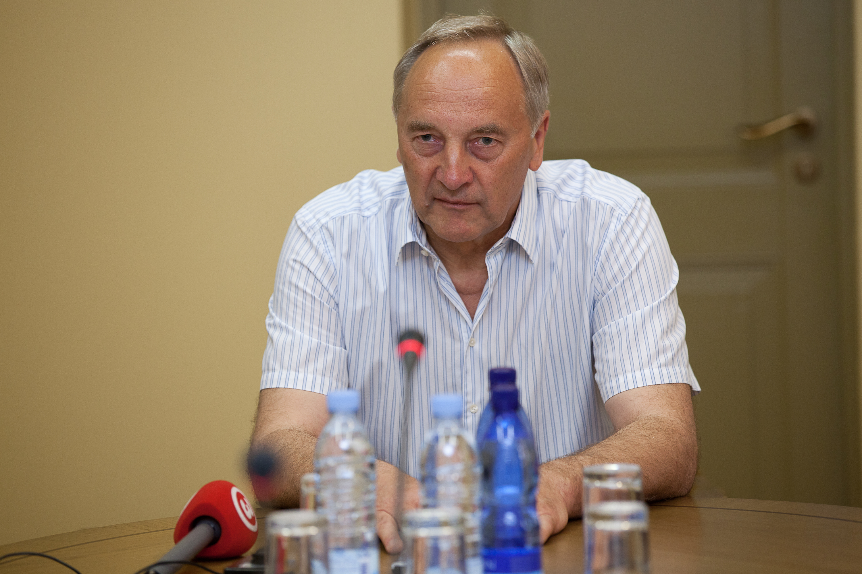 Andris Bērziņš 2011.gada 1.jūnijs. Mandātu, ētikas un iesniegumu komisijas sēde, kurā deputāti pārbauda, vai kandidatūras, kas izvirzītas Valsts prezidenta amatam, atbilst Valsts prezidenta ievēlēšanas likuma noteikumiem. Foto: Saeima